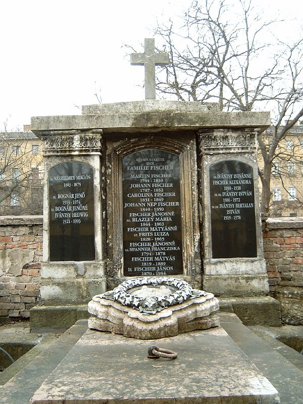 Szerelmey Miklós, Lieb (Győr, 1802. júl. 3. – Bp., 1875. aug. 5.) feltaláló, litográfus és mérnök és a vele rokon Fischer, Bognár és Ivántsy család síremléke Budapesten. Kerepesi temető: J. 22.